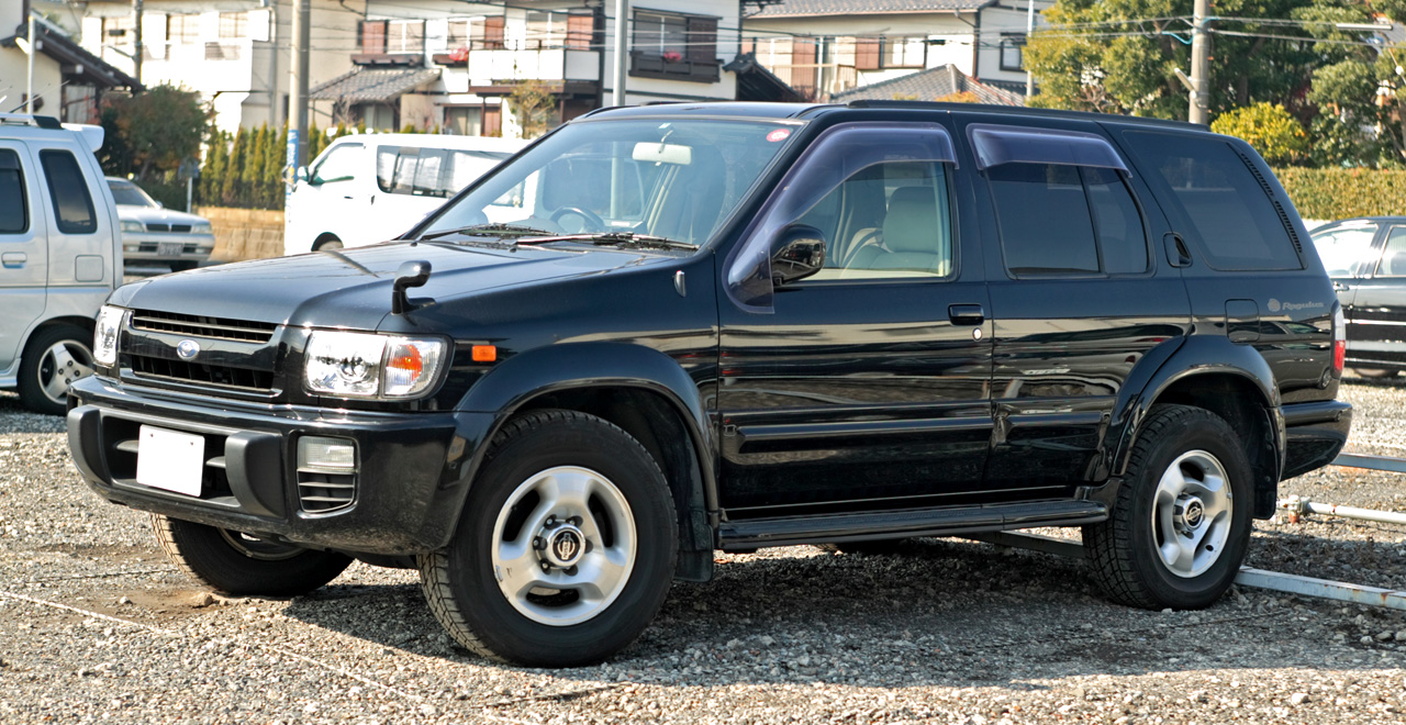 Nissan Terrano Reglus